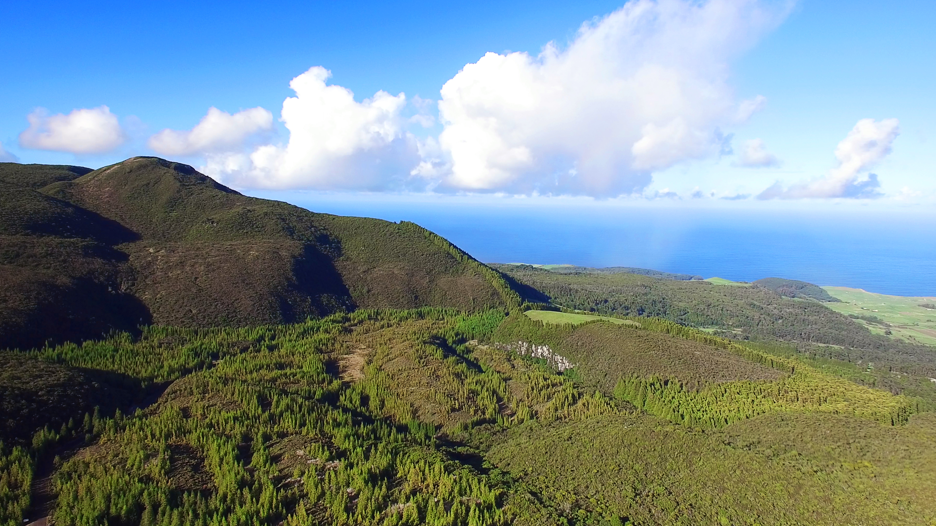 Vista do Pico Alto sobre a freguesia da Algualva, no concelho da Praia da Vitória, Ilha Terceira - Açores. Produção do projecto FocusAG